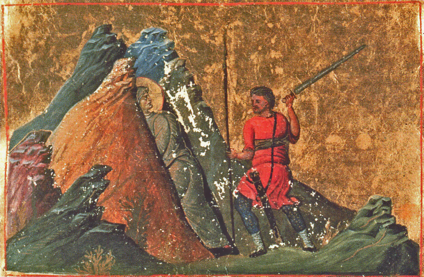 Η αγία Αριάδνη (η και Μαρία ονομαζομένη) η εν Φρυγία – 18 Σεπτεμβρίου // Saint Ariadne Ариадна Промисская (Фригийская), мц. Миниатюра Минология Василия II. Константинополь. 985 г. Ватиканская библиотека. Рим